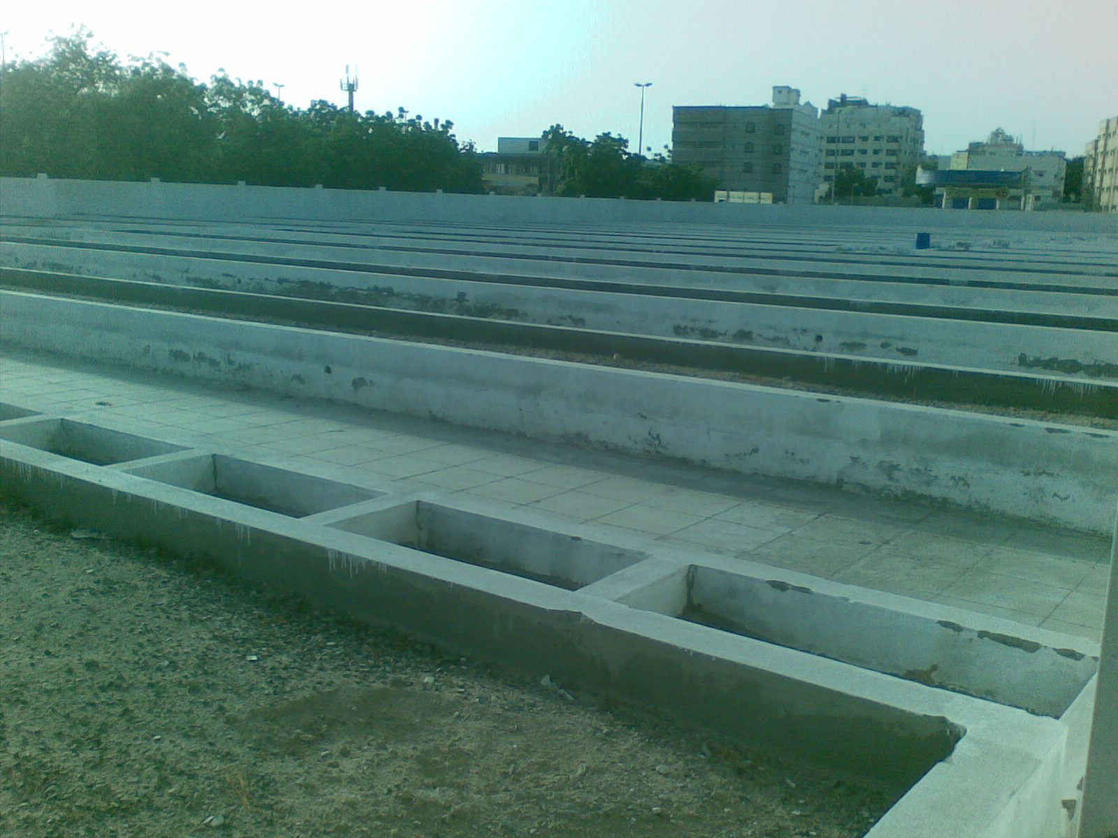 ജിദ്ദയിലെ ഹവ്വ ഖബറിടം